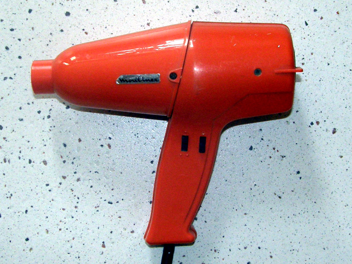 Sèche cheveux Moulinex vers 1975